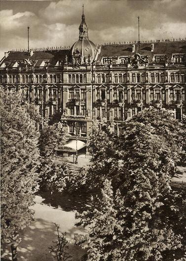 Ansicht des (ehemaligen) Hotels Bristol in Berlin, Unter den Linden 5-6.